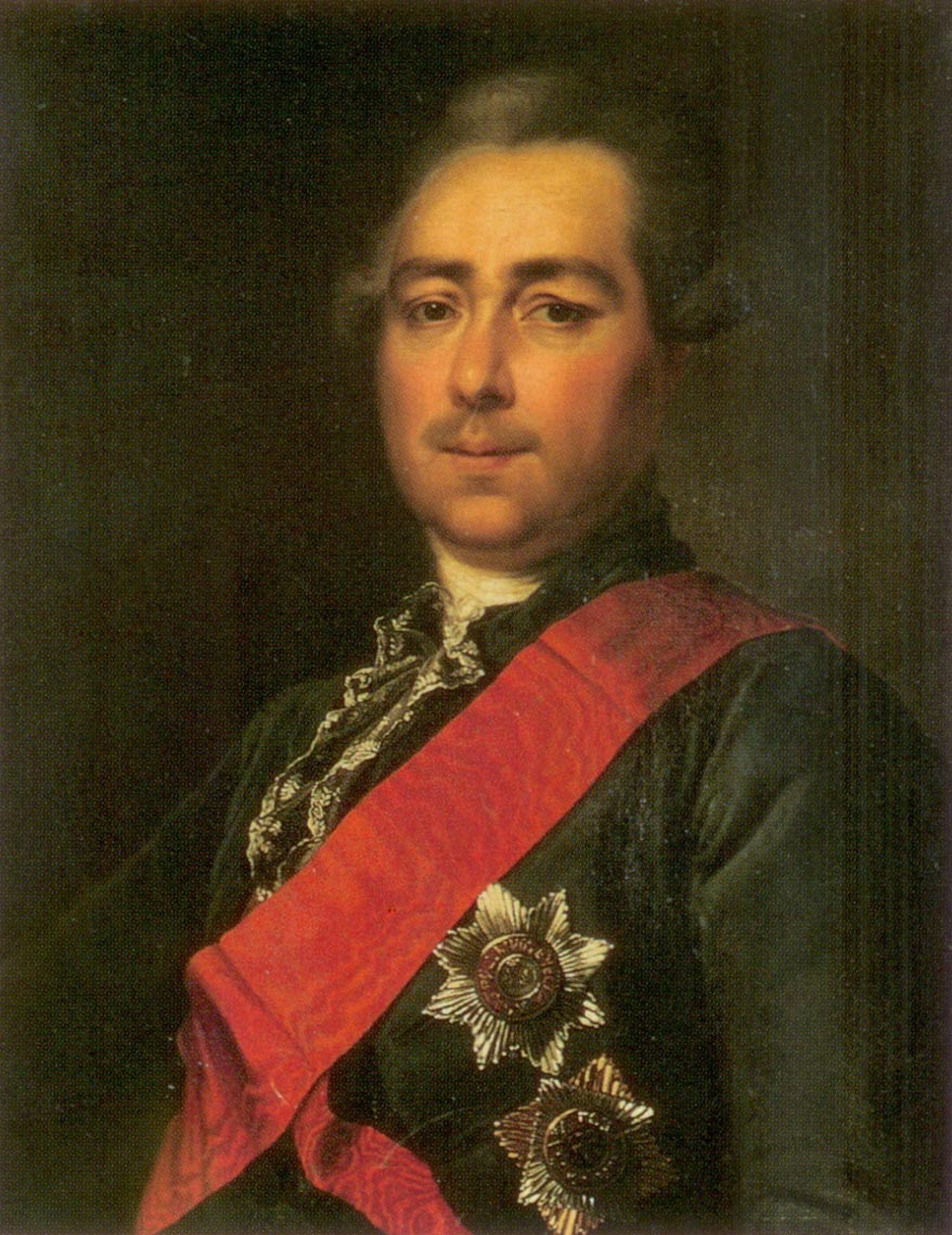 граф Александр Романович Воронцов (1741—1805) — государственный канцлер